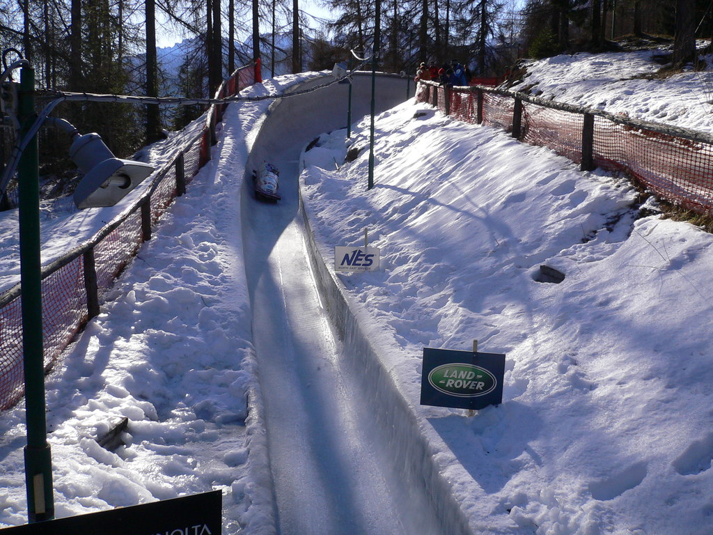 Probabilmente (dice l'autore) un equipaggio Giapponese, pista Eugenio Monti, Cortina, 2007